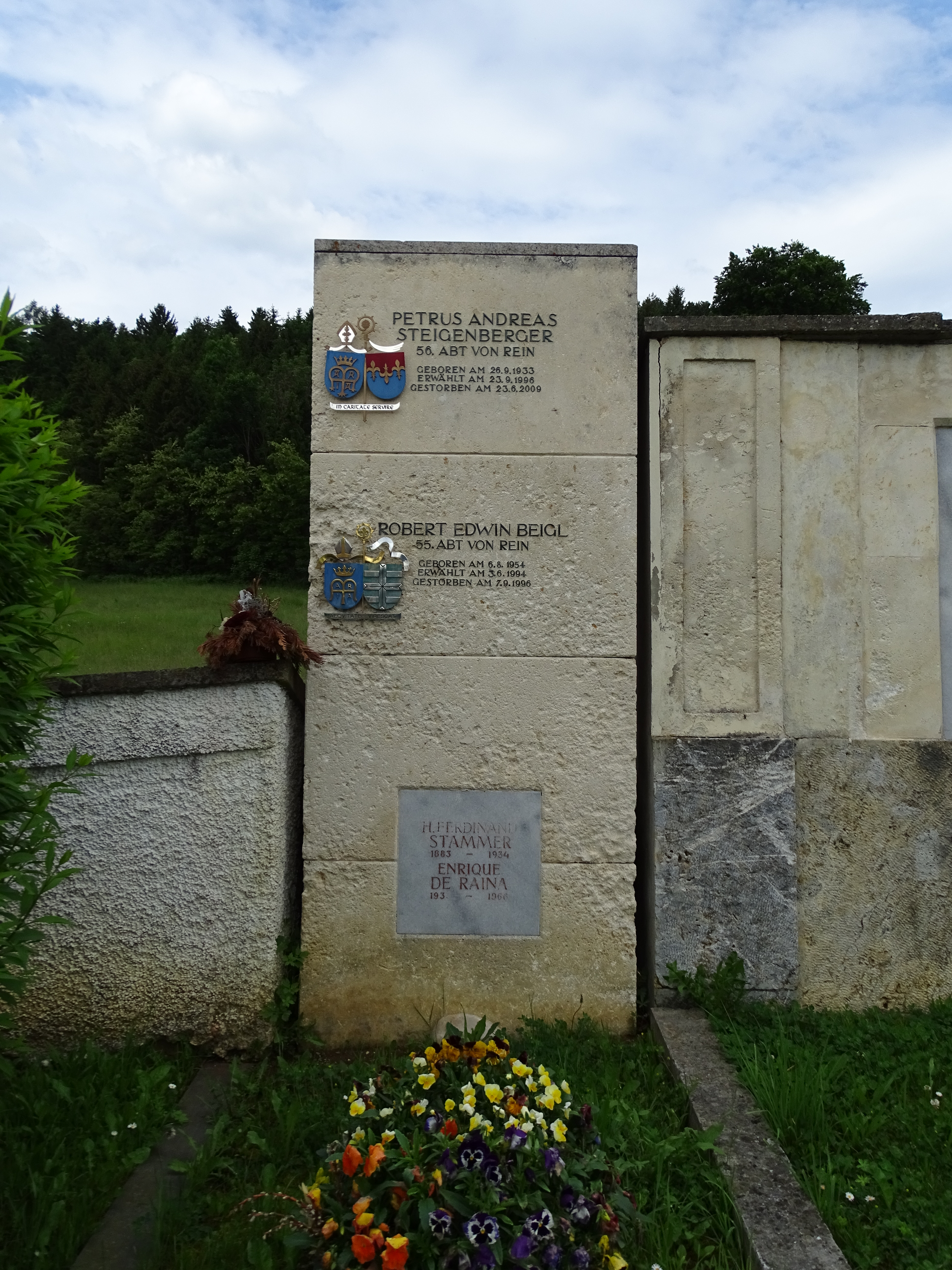 Die Abt- und Patresgräber am Friedhof Stift Rein-Eisbach